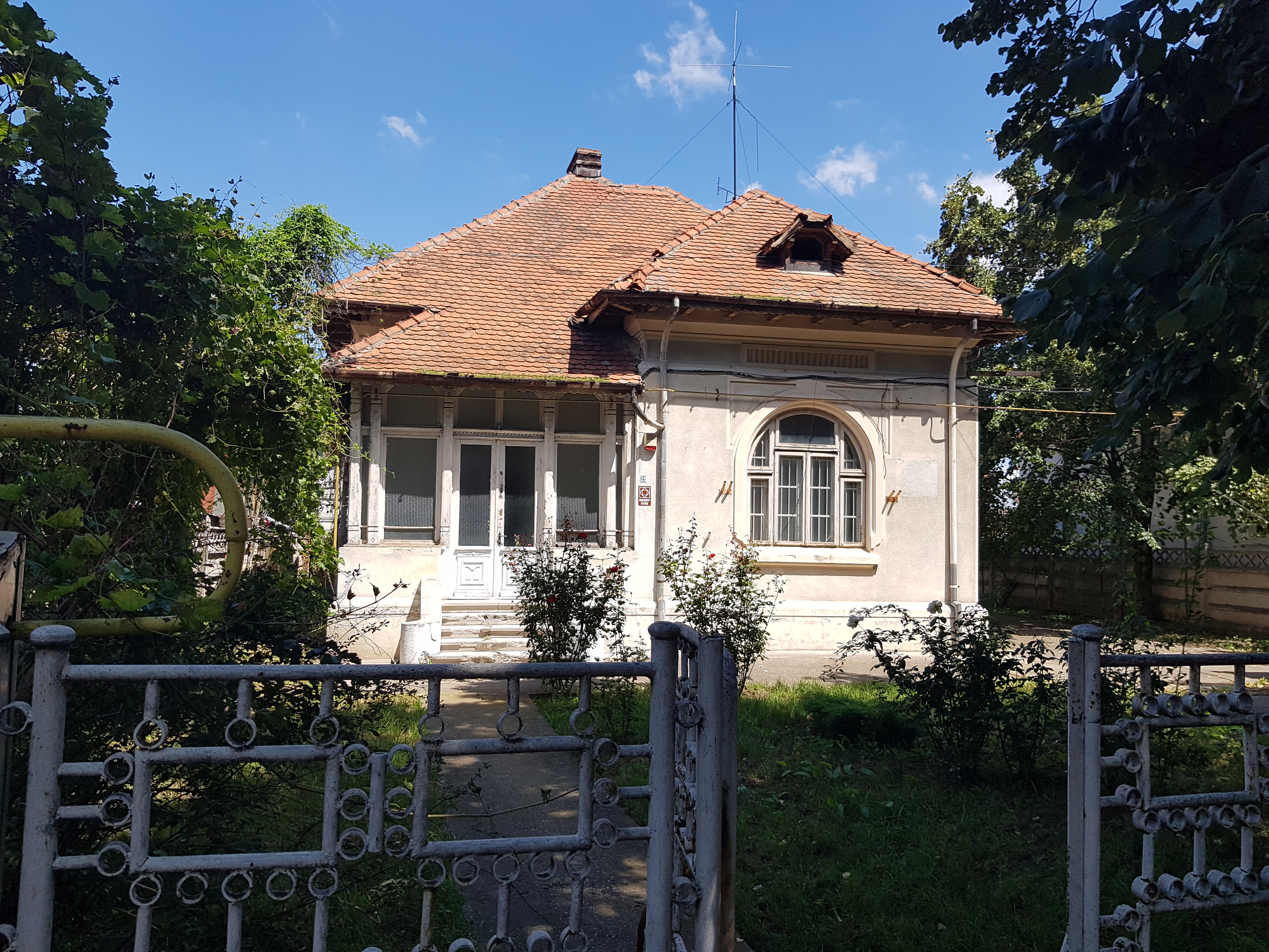 Casa Pușcă